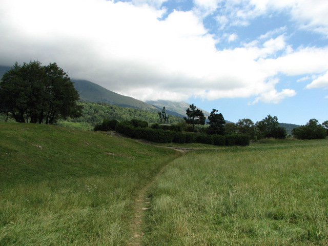 Prairie de la Rencontre à Laffrey avec la statue équestre de Napoléon